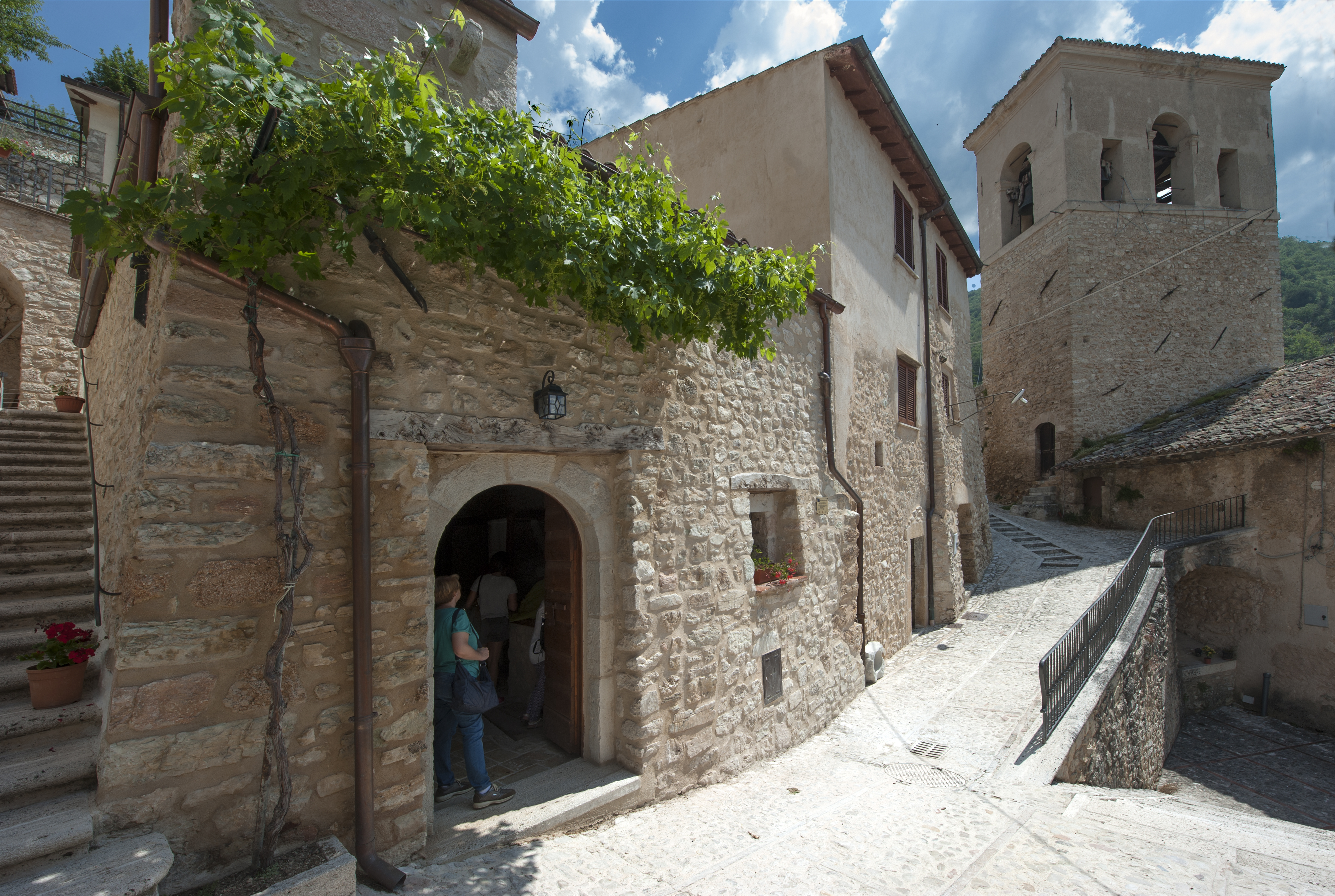 Campi di Norcia